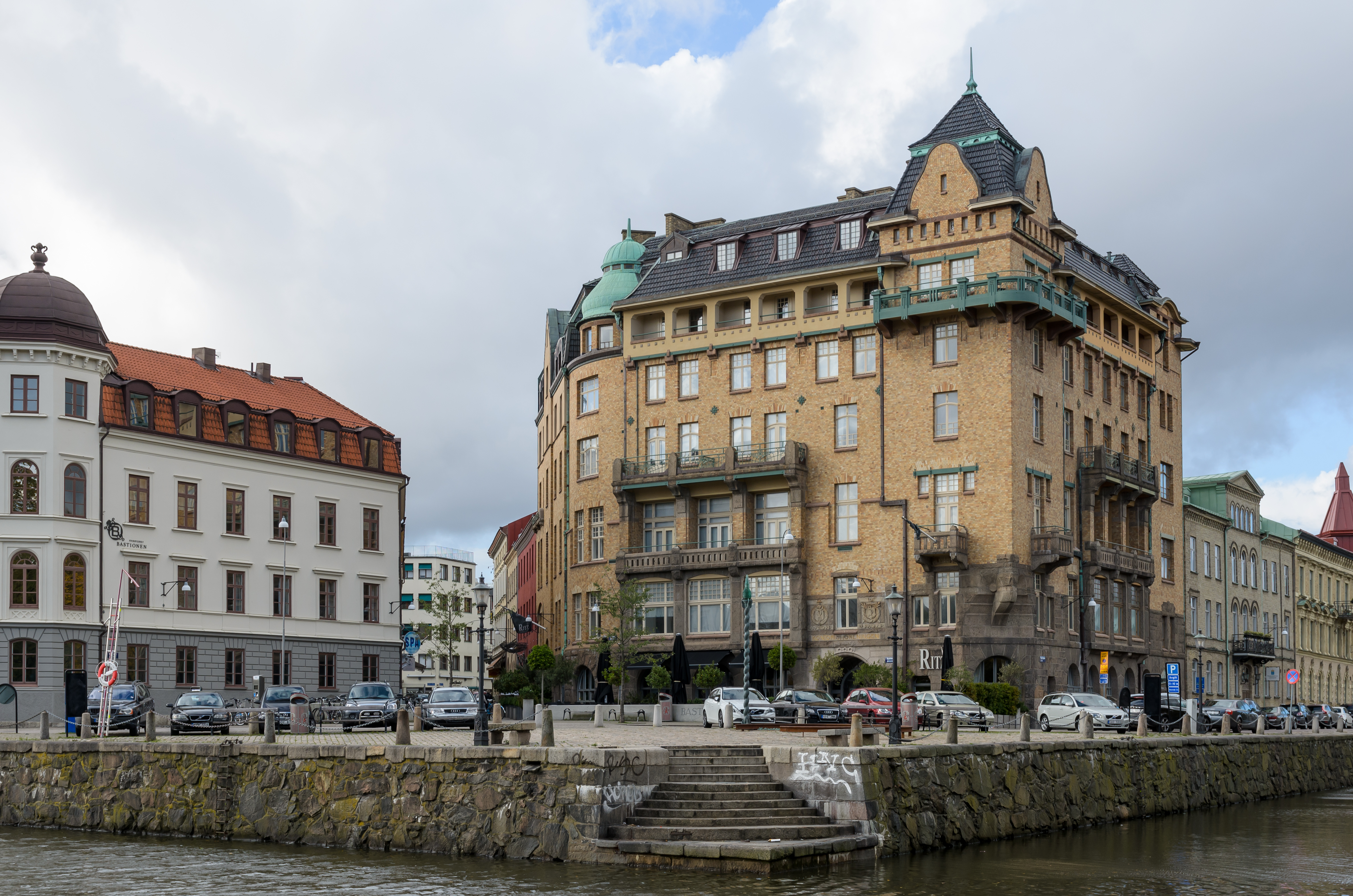 Bastionsplatsen is a small square in central Gothenburg. To the right, Kontorisföreningens hus built 1905-08. Architect Hans Hedlund.